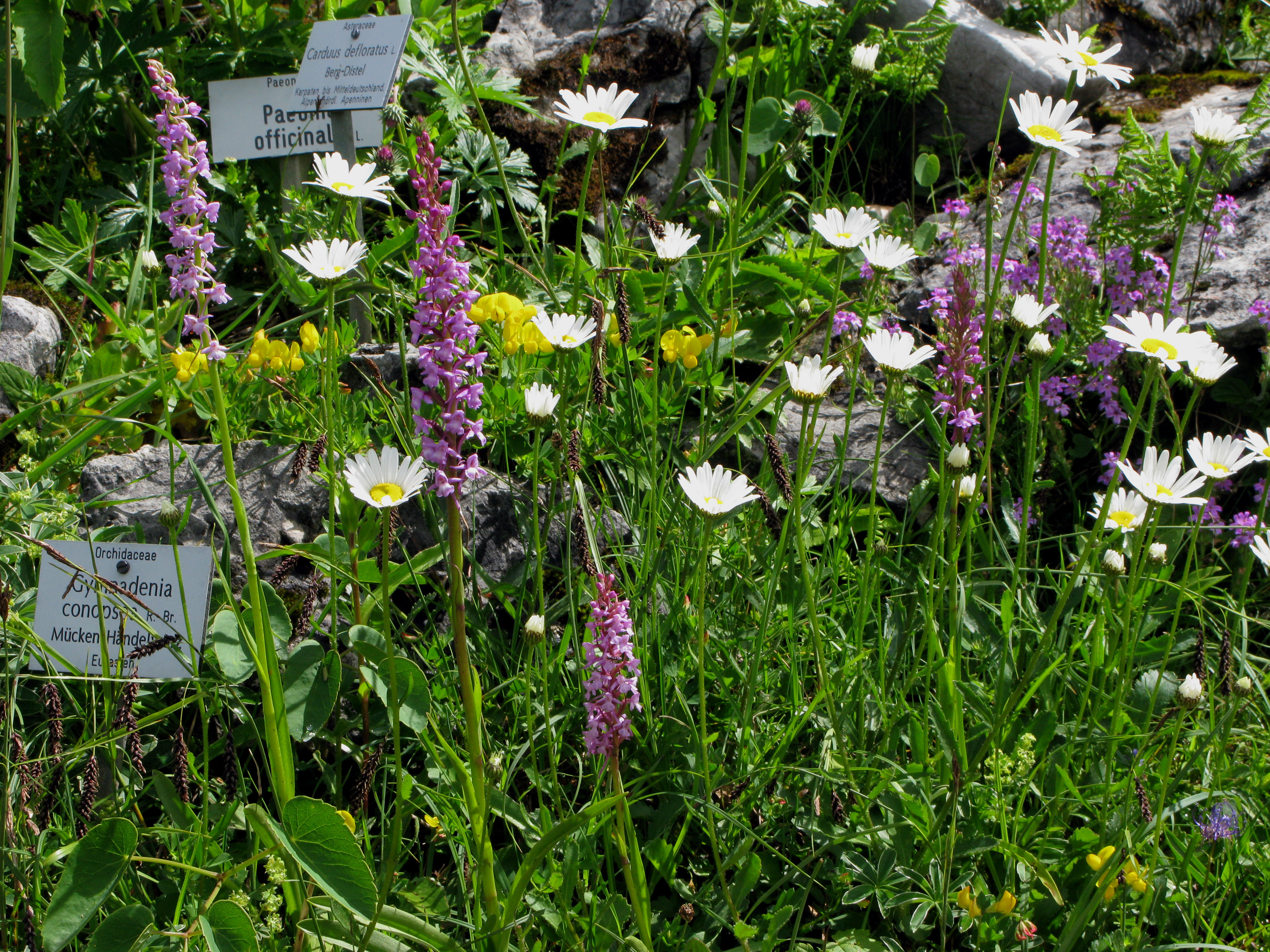 Beschreibung kommt noch